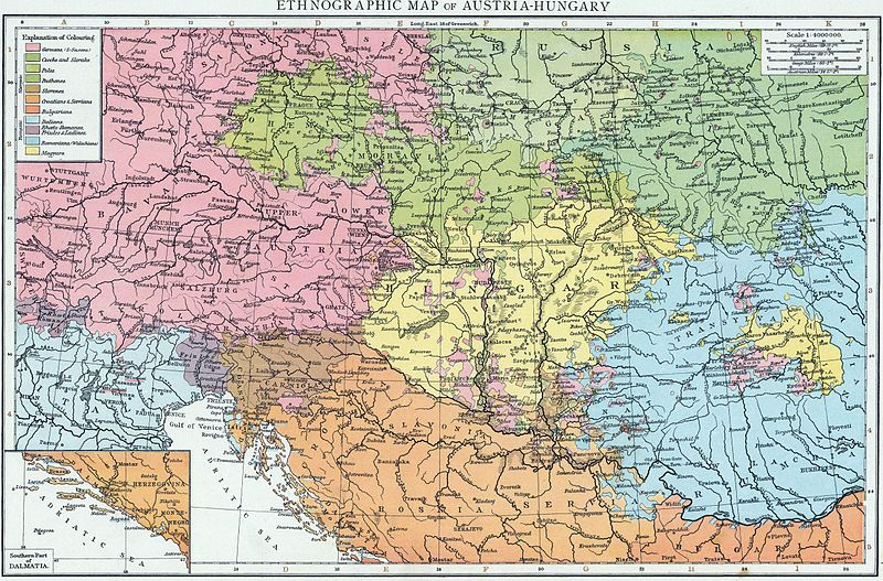 Copia del WIKOMEDIA COMMONS FILE:Austria-Hungary(ethnic).JPG